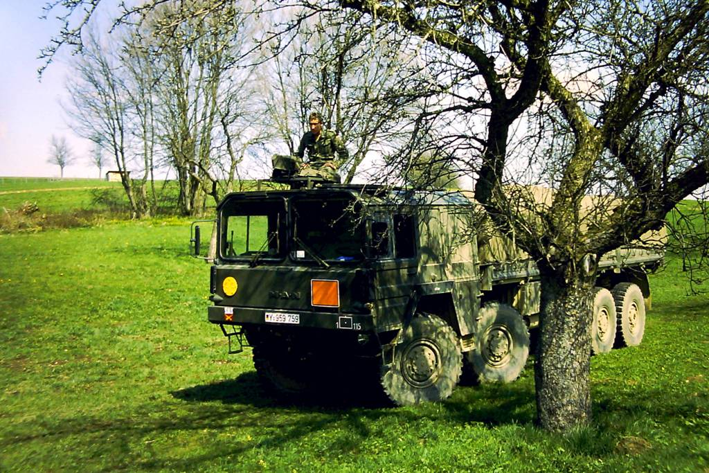 MAN 10 to gl LKW während eines Manövers im Jahr 1982. Mit einer Nutzlast von 10 to im ArtBtl eingesetzt zum Munitionstransport